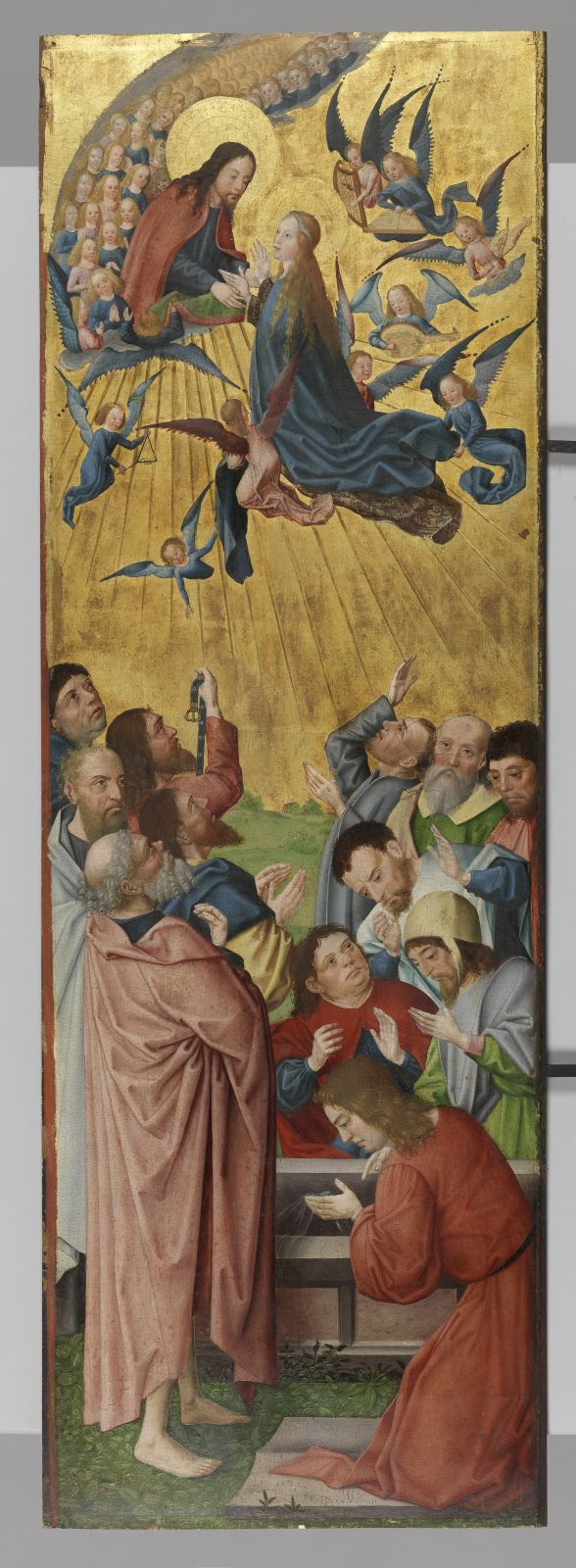 Retable des sept joies DD face